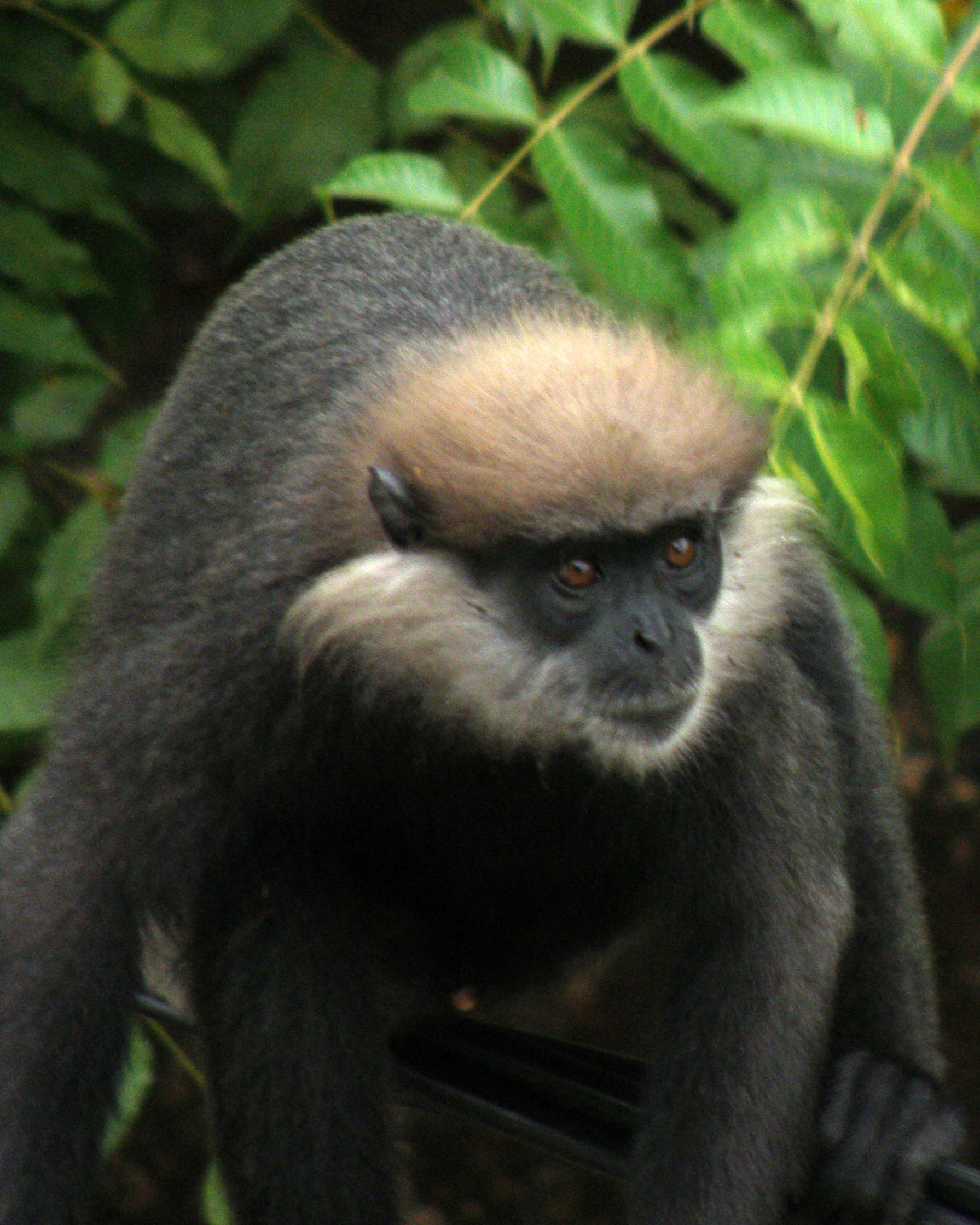 Semnopithèque blanchâtre (Trachypithecus vetulus) en maraude au centre ville de Galle (Sri Lanka)